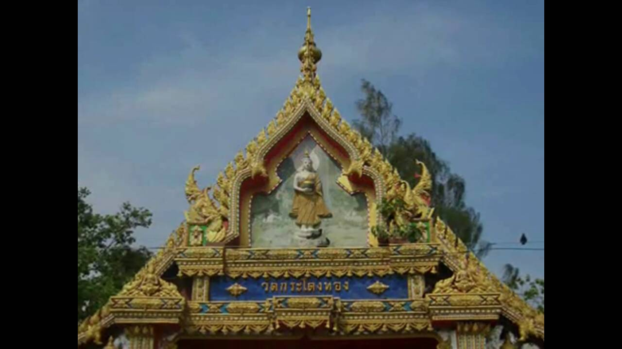 ภาพถ่ายหน้าวัด